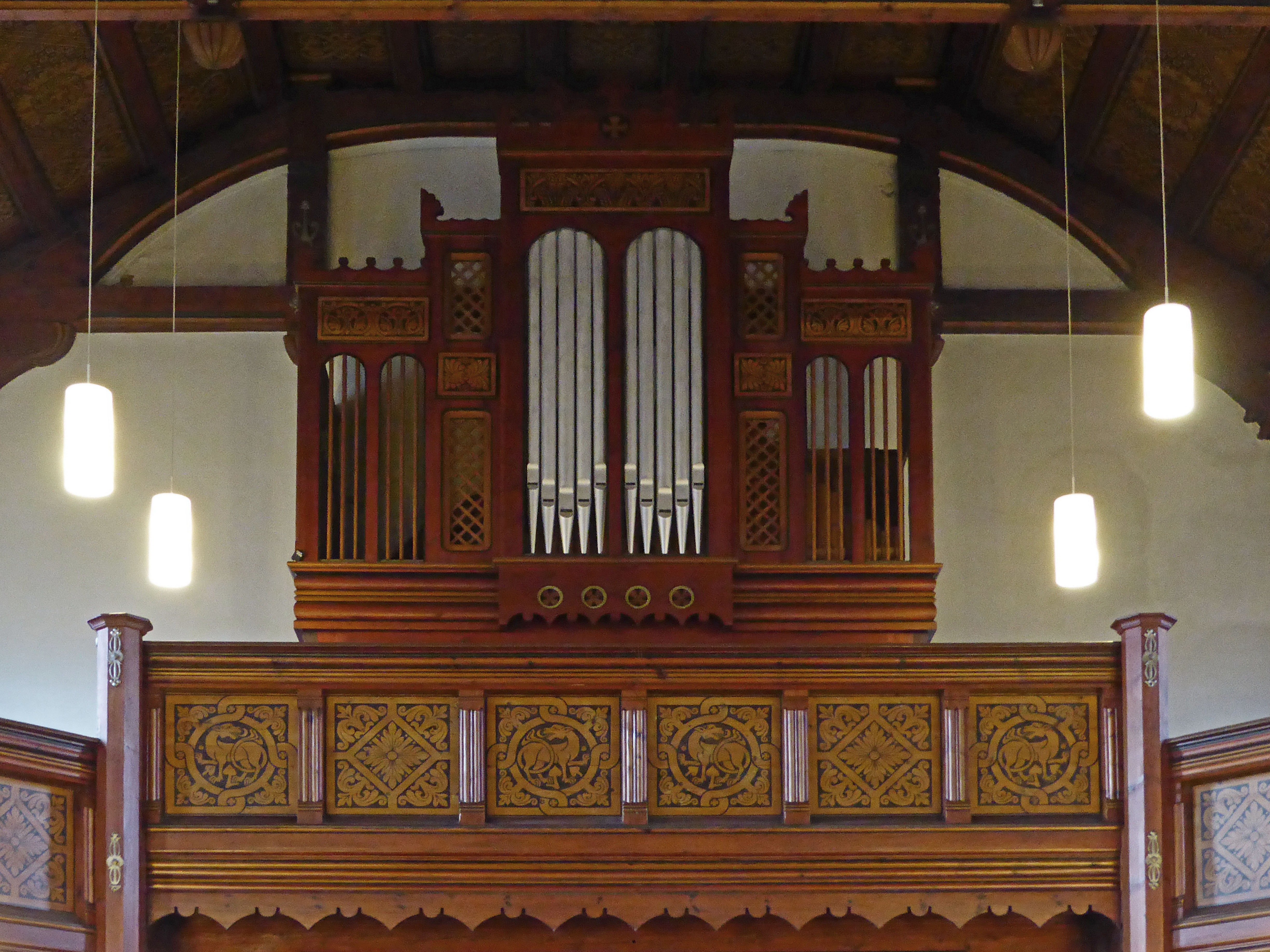 Orgel in der katholischen St.-Marien-Kirche in Schladen.